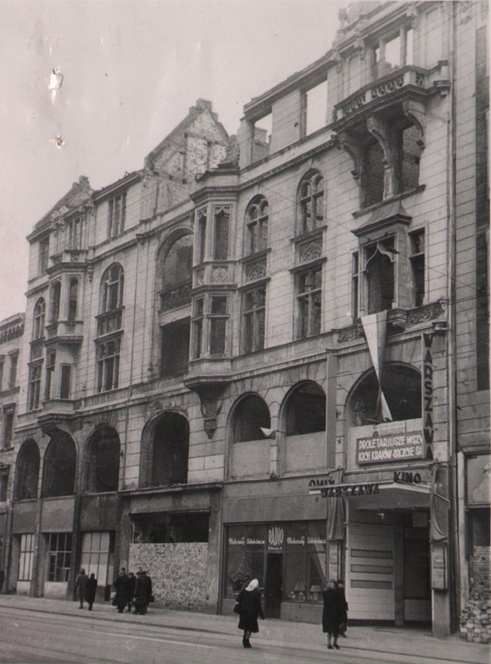 Kamienica nr 16 - wejście do Kina Warszawa ( lata 1945-1950)